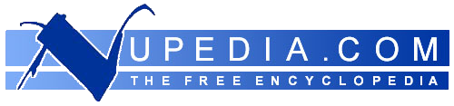 Nupedia logo by